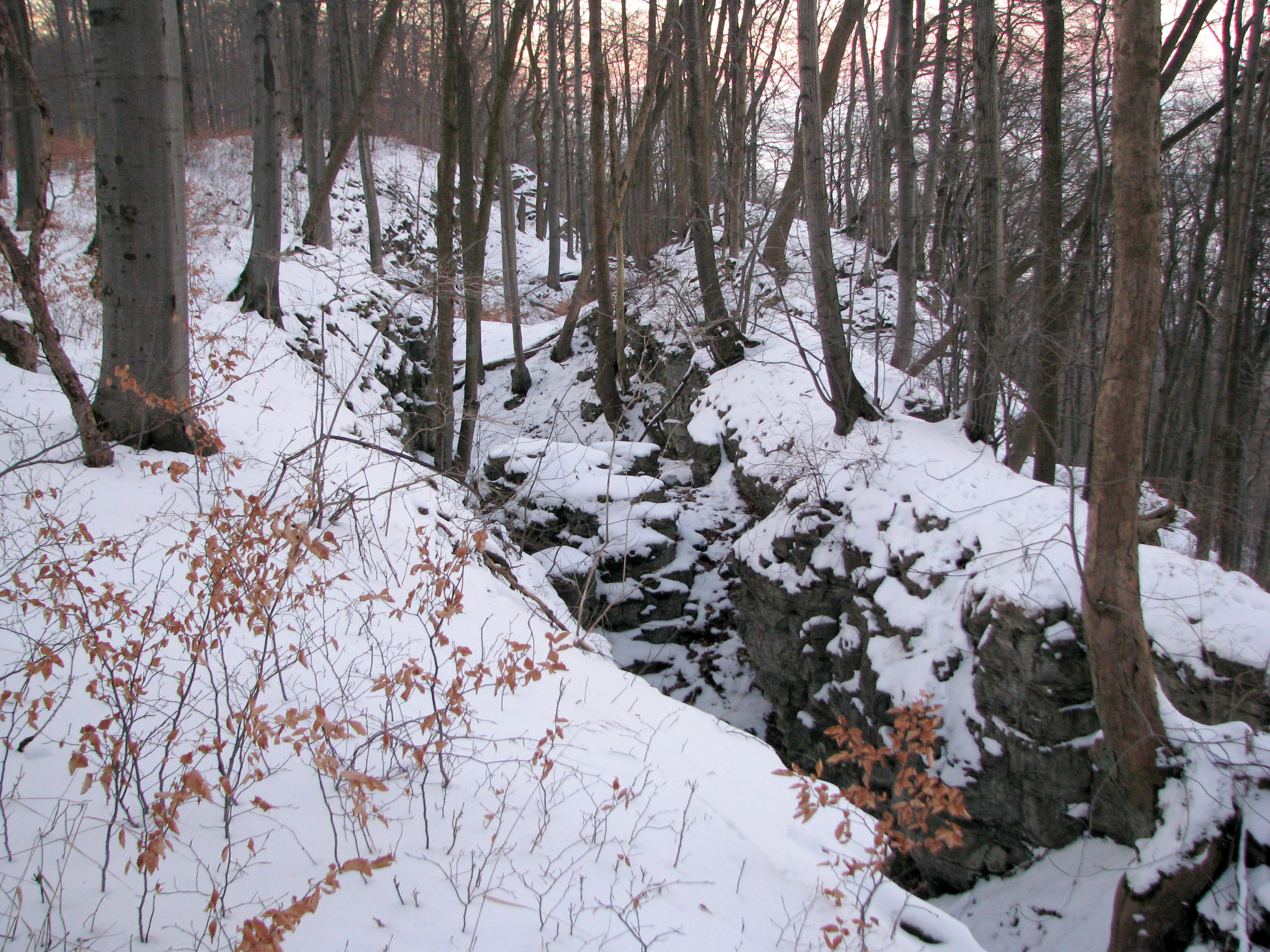 Die Teufelslöcher bei Hüpstedt im mittleren Dün, ein Muschelkalk-Felsabbruch an der Nordkante des Höhenzuges. Winteraspekt mit Schnee.